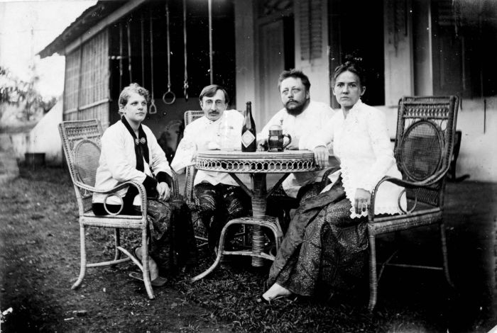 Foto. Keluarga Schalwijk dan Mertens di halaman dengan minuman. Para ibu mengenakan kebaya dan kain buatan lokal.